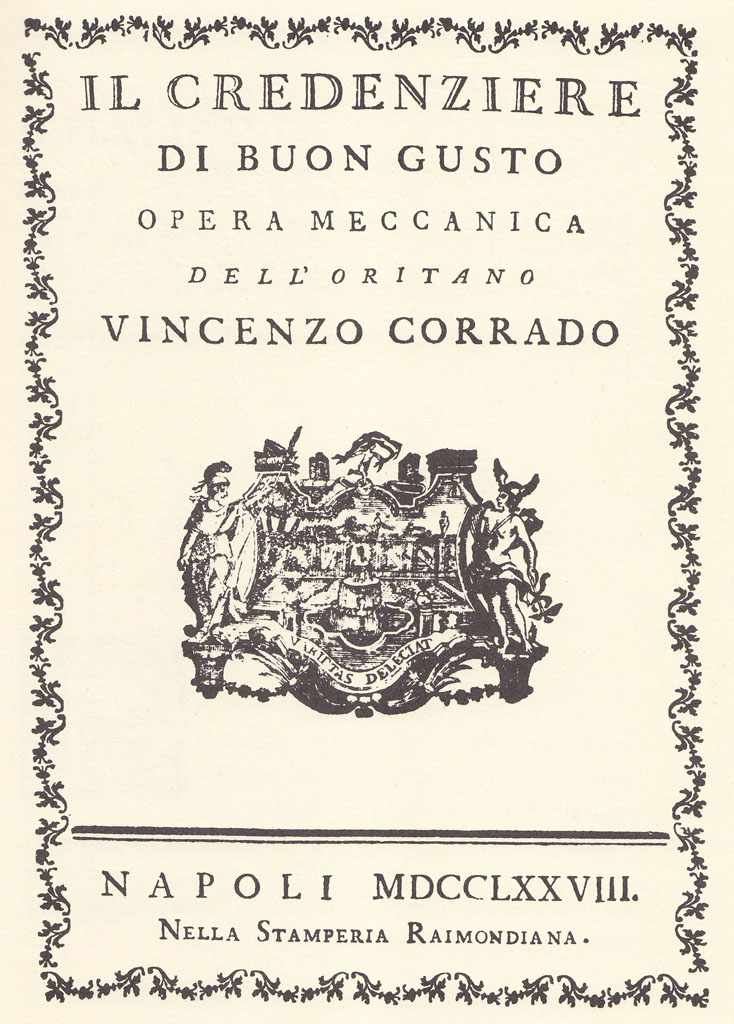 copertina tratta dall'antico libro del 1800 scritto da Vincenzo Corrado. Trattato di pasticceria dell'epoca